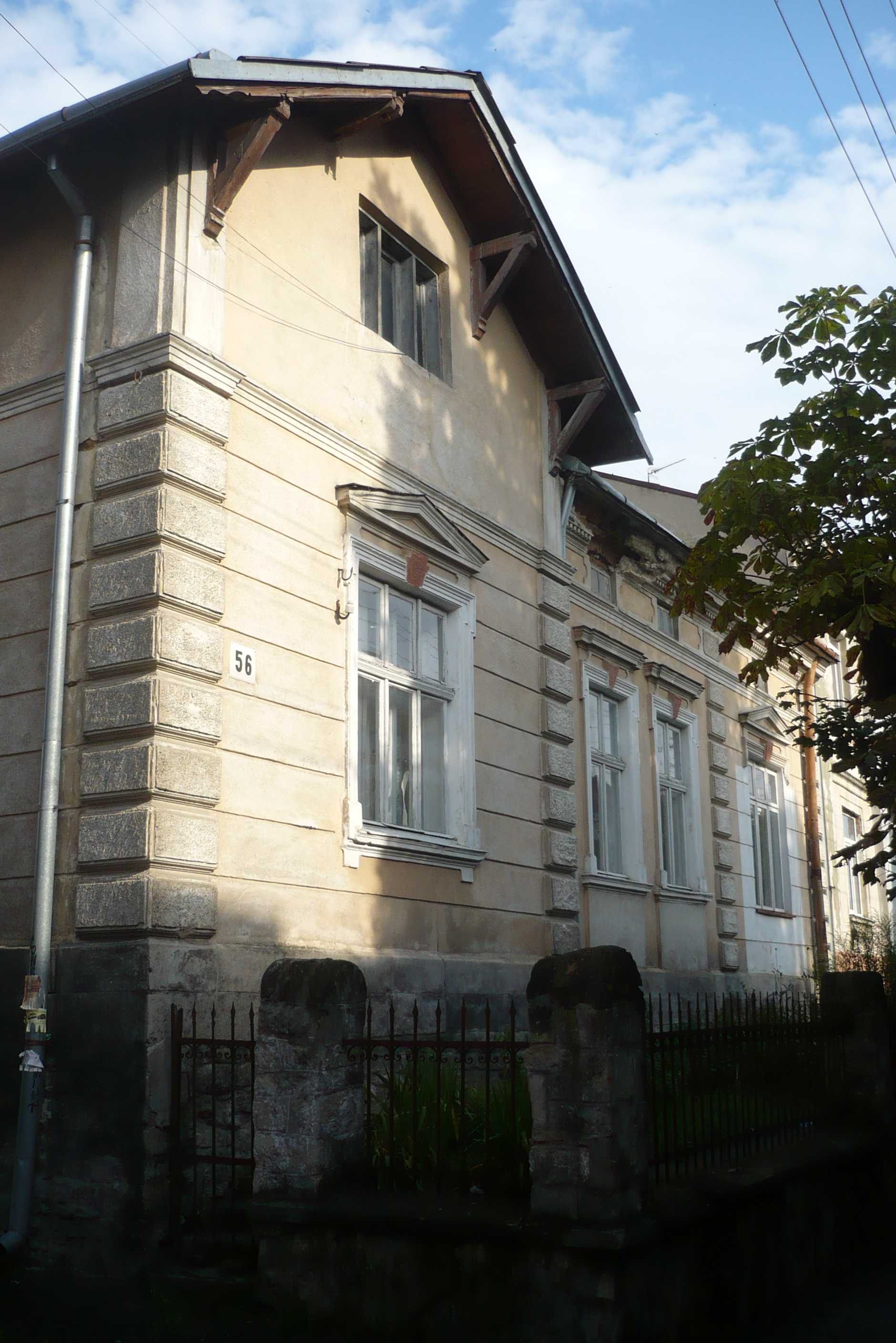 Dom w Złoczowie